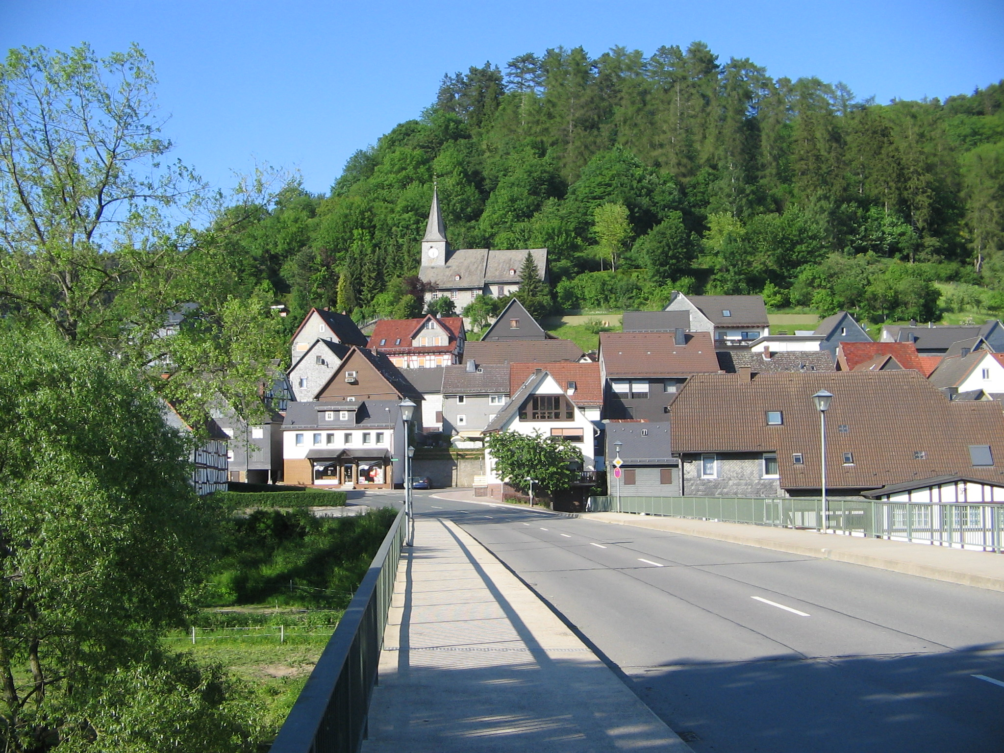 Bildbeschreibung: Hatzfeld (Eder) Sommer 2006 Quelle: selbst fotografiert Fotograf/Zeichner: T.Weber Datum: 12.06.2006 Sonstiges: ...